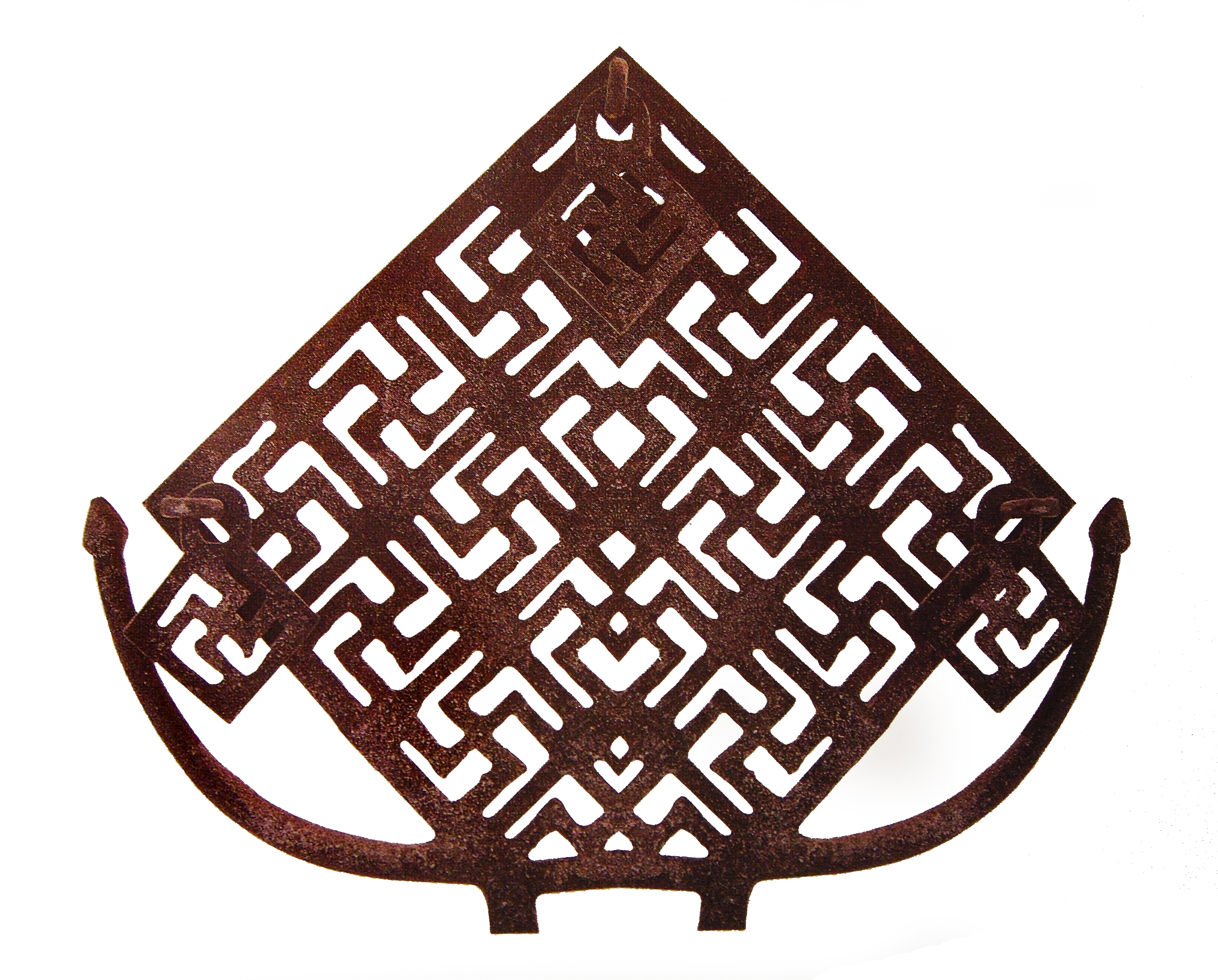 Hitit Güneş Kursu